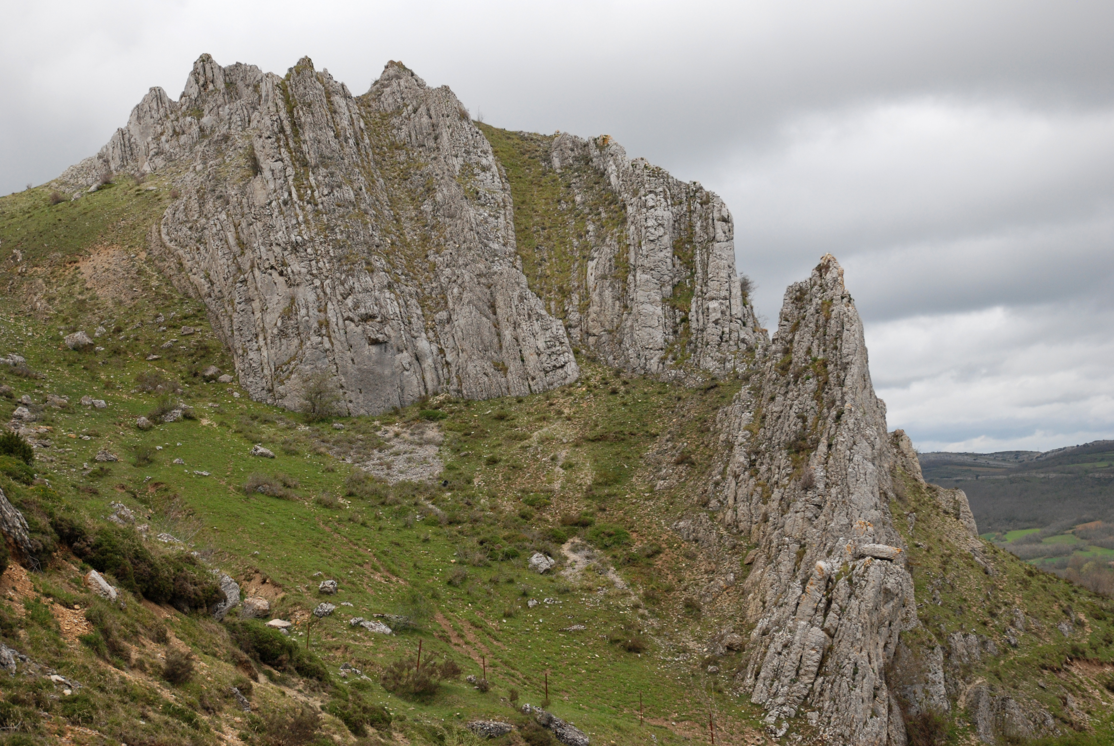 Formaciones de Peña Ulaña (Burgos, España). Pertenece al LIC ES4120093 Humada-Peña Amaya de la Red Natura 2000. Geoparque de Las Loras. This is a photography of a Site of Community Importance in Spain with the ID: ES4120093. Natura2000 entry, EEA entry